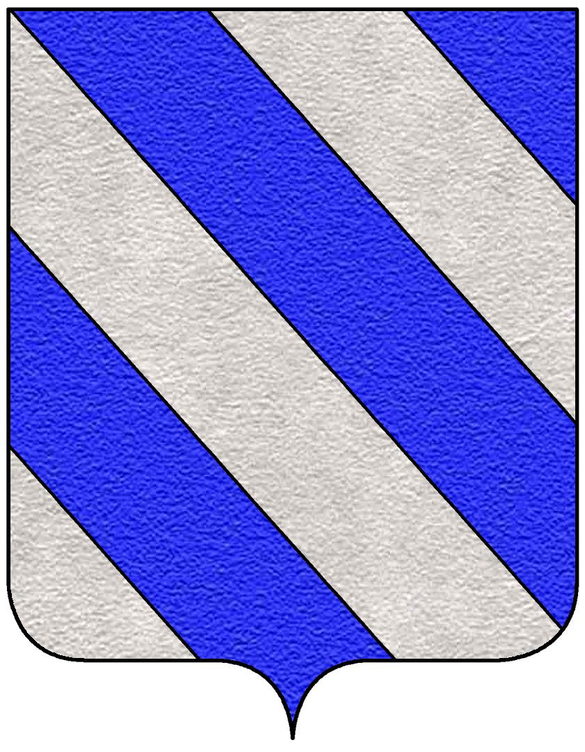 Stemma della famiglia Fieschi